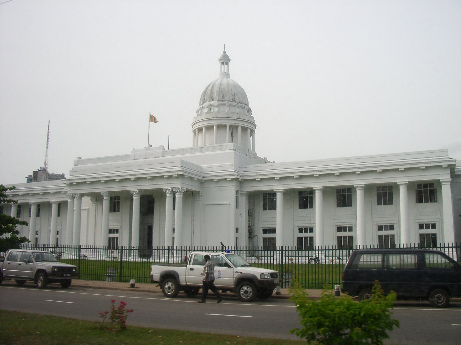 Colombo, seu del govern d'Sri Lanka, foto feta per J. Ollé el juliol del 2006